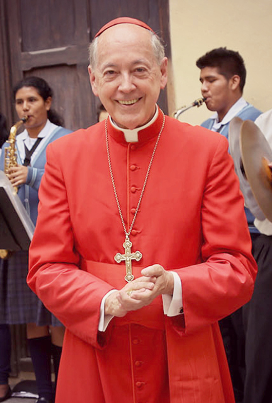 Cardenal Juan Luis Cipriani Thorne